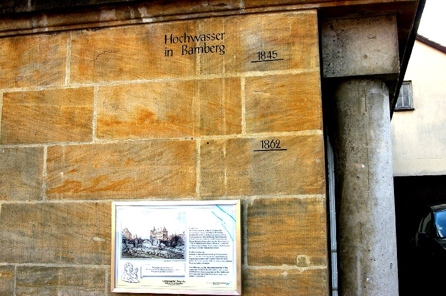 Bamberg - Hochwassermarke am Dominikanerkloster